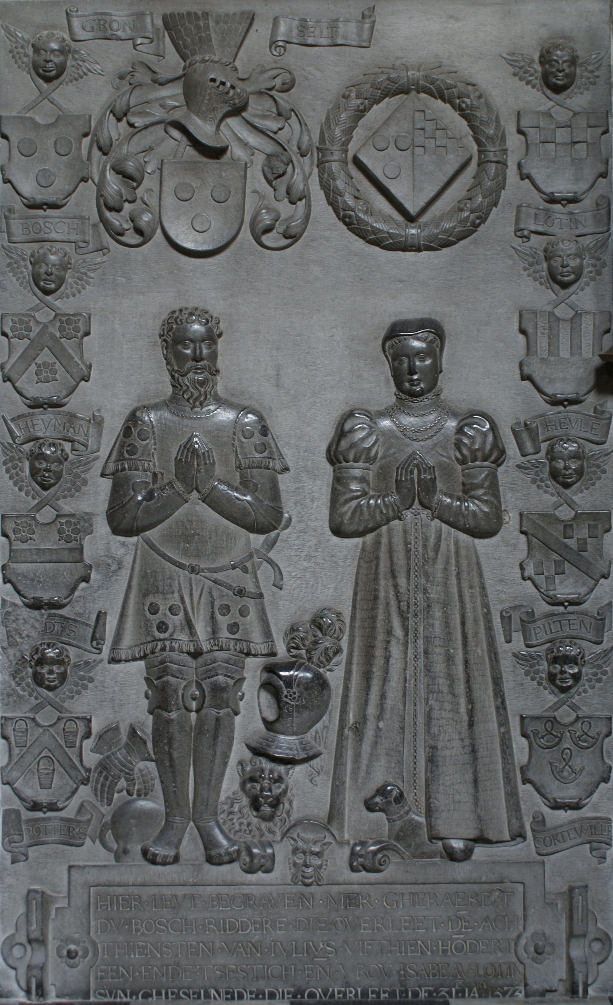 Sint-Martinuskerk (Aalst) - Grafmonument van Ridder Du Bosch en Isabeau Lotin